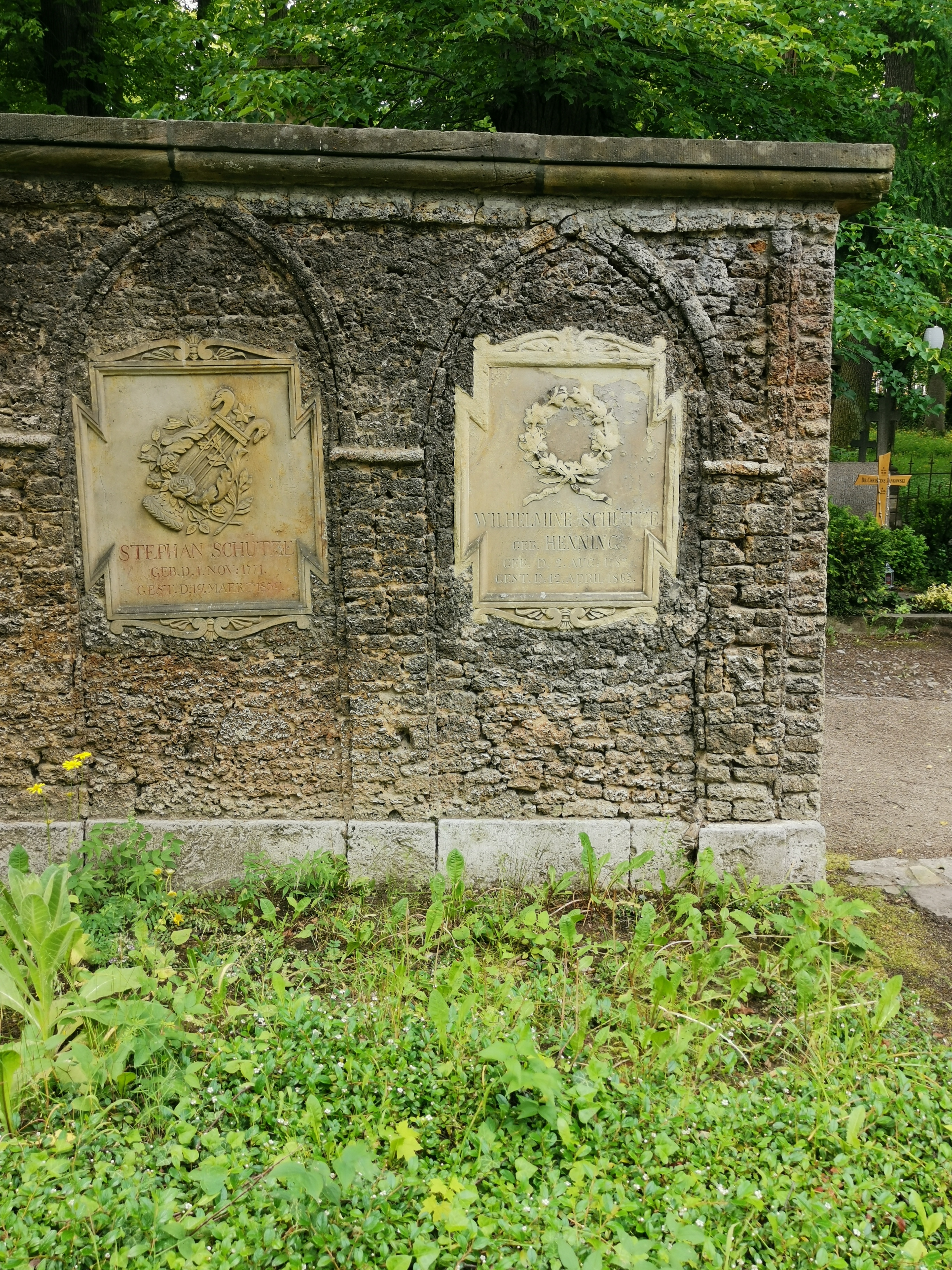 Grabstätte Stephan und Wilhelmine Schütze; Historischer Friedhof Weimar